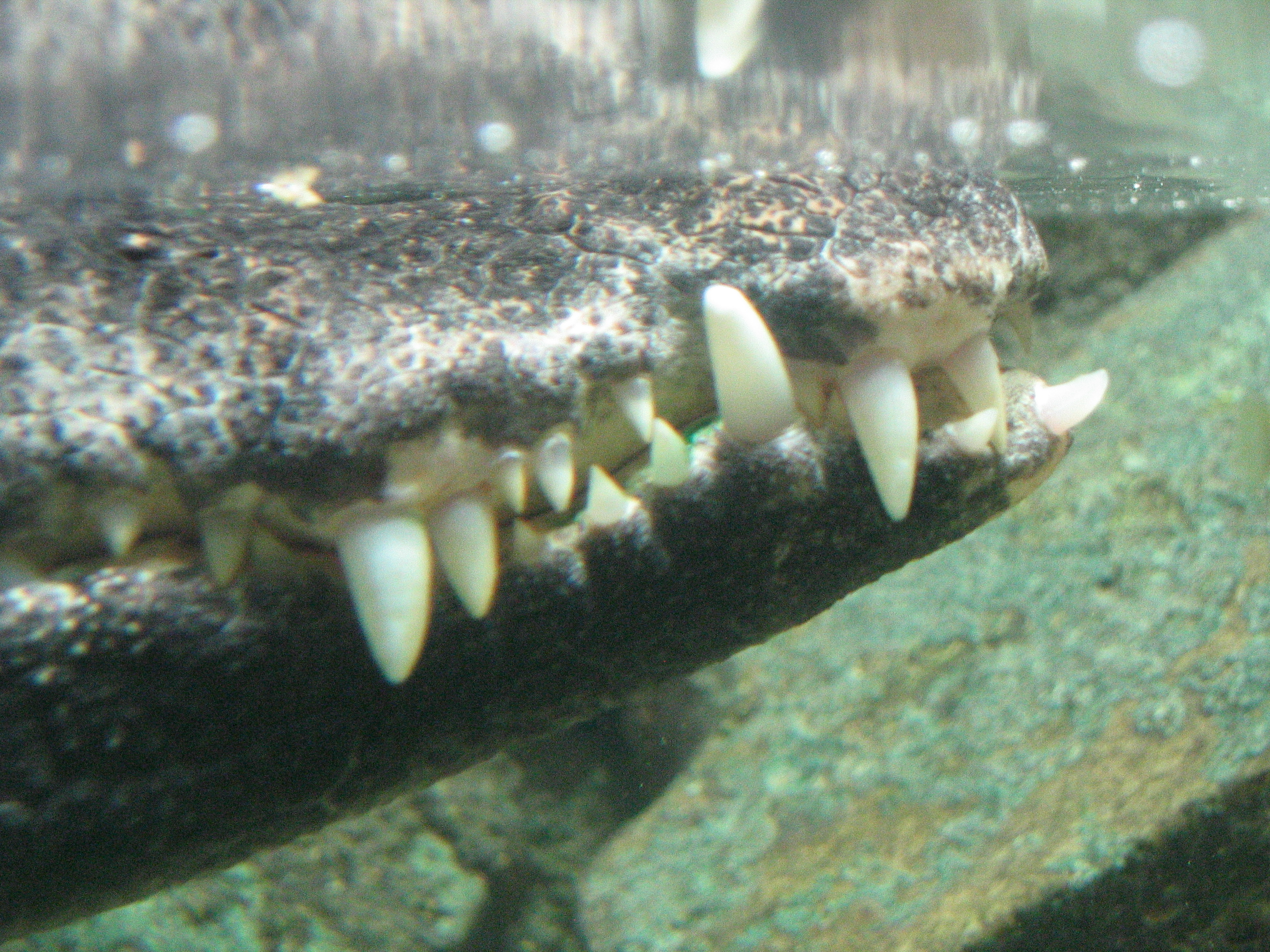 Dentition crocodile nain